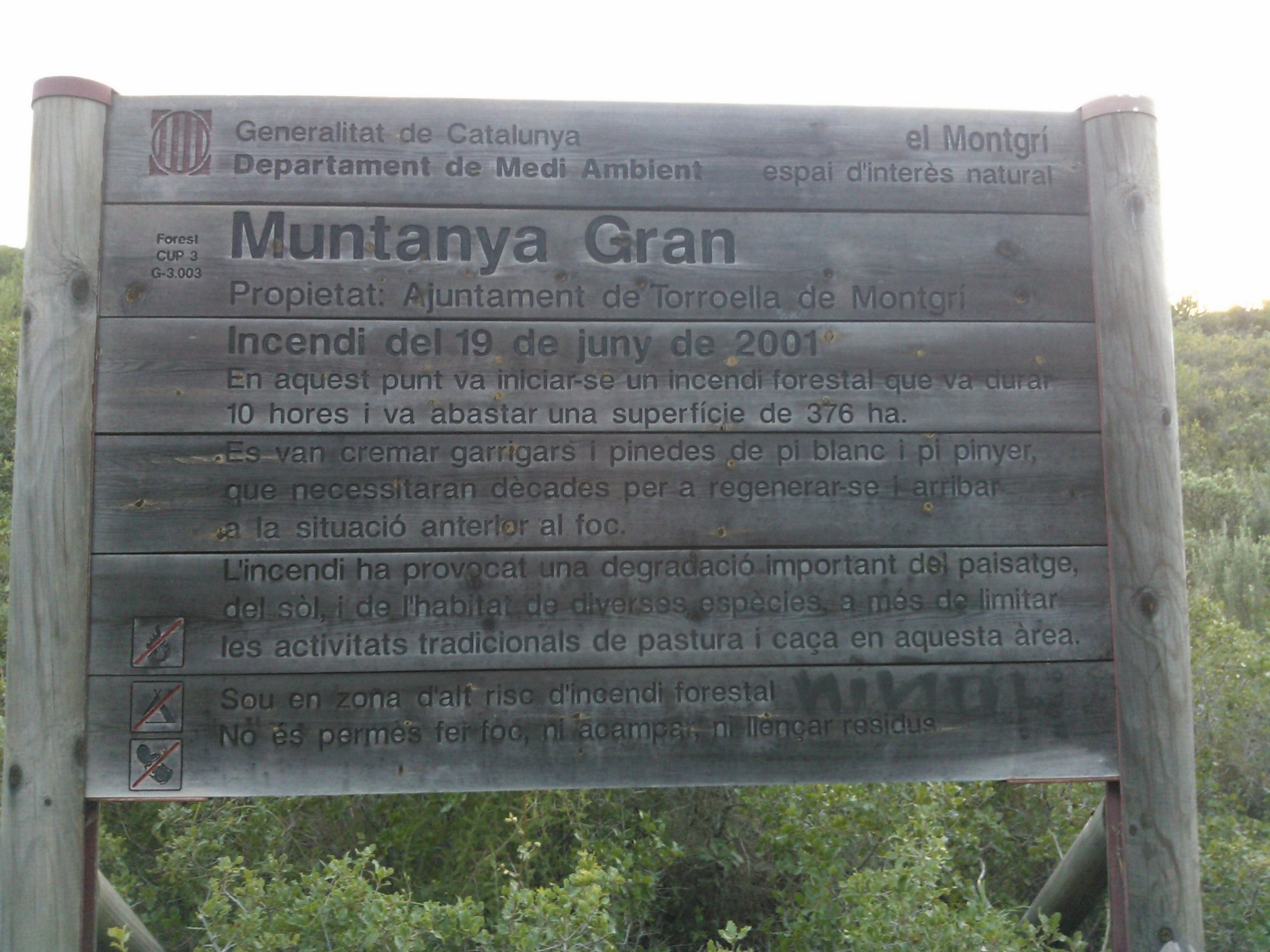 Cartell informatiu de l'inici de l'incendi al Parc de Torroella de Montgrí